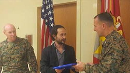 Il comandante dei Marines premia Lorenzo Muscoso